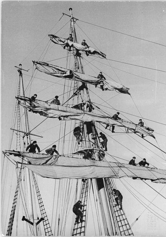 Segelschulschiff "Wilhelm Pieck", Besatzung auf Mast Segelschulschiff "Wilhelm Pieck" Die zukünftigen Kapitäne, Steuerleute und Maate unserer Handelsflotte werden auf der schmucken Zweimaster-Schonerbrigg "Wilhelm Pieck" in einem 10-wöchigen Lehrgang ausgebildet. Die Schüler, die aus allen Teilen der DDR kommen und der Interessengemeinschaft für Wassersport der Freien Deutschen Jugend angehören, lernen unter Anleitung des erfahrenen Kapitäns Weitendorf, der vier Offiziere und einer 10-köpfigen Stammannschaft mit grosser Begeisterung die Bedienung des Segelschiffes. Sie wissen, dass der Tag eines einheitlichen Deutschlands nicht mehr fern ist und freuen sich darauf, mit unseren Handelsschiffen alle Meere befahren zu können. Was sie gelernt haben, werden sie dann erst richtig beweisen können. UBz: Das Aufentern ist bei hohem Seegang nicht einfach. Mut und Geschicklichkeit gehören dazu, die Segel am Fockmast zu lösen.- Zentralbild-Sturm 27.12.1951